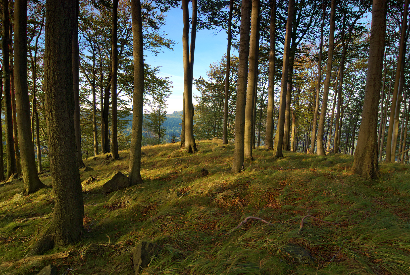 Bukový porost.